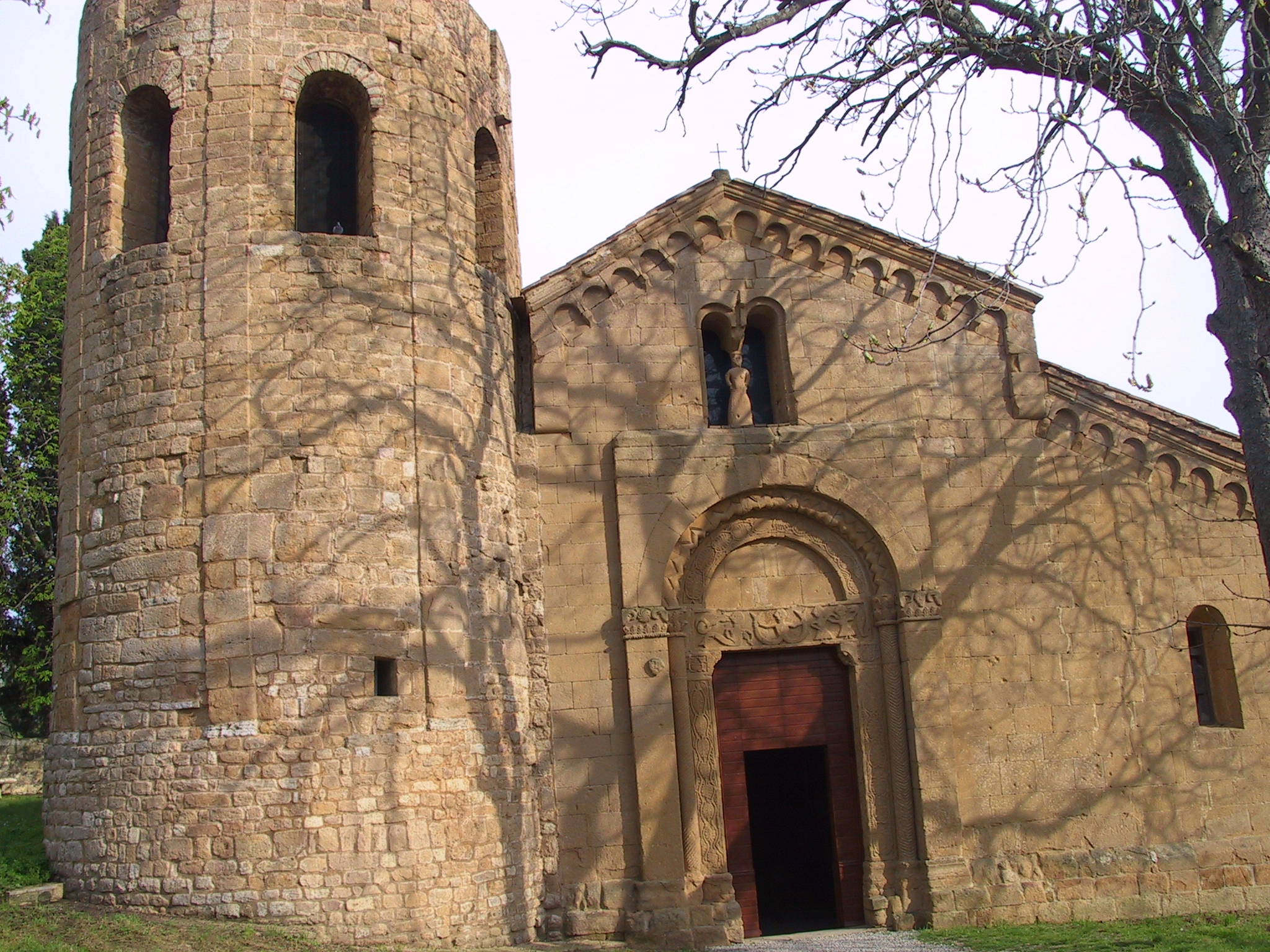 Pieve di Corsignano, Pienza, Italy